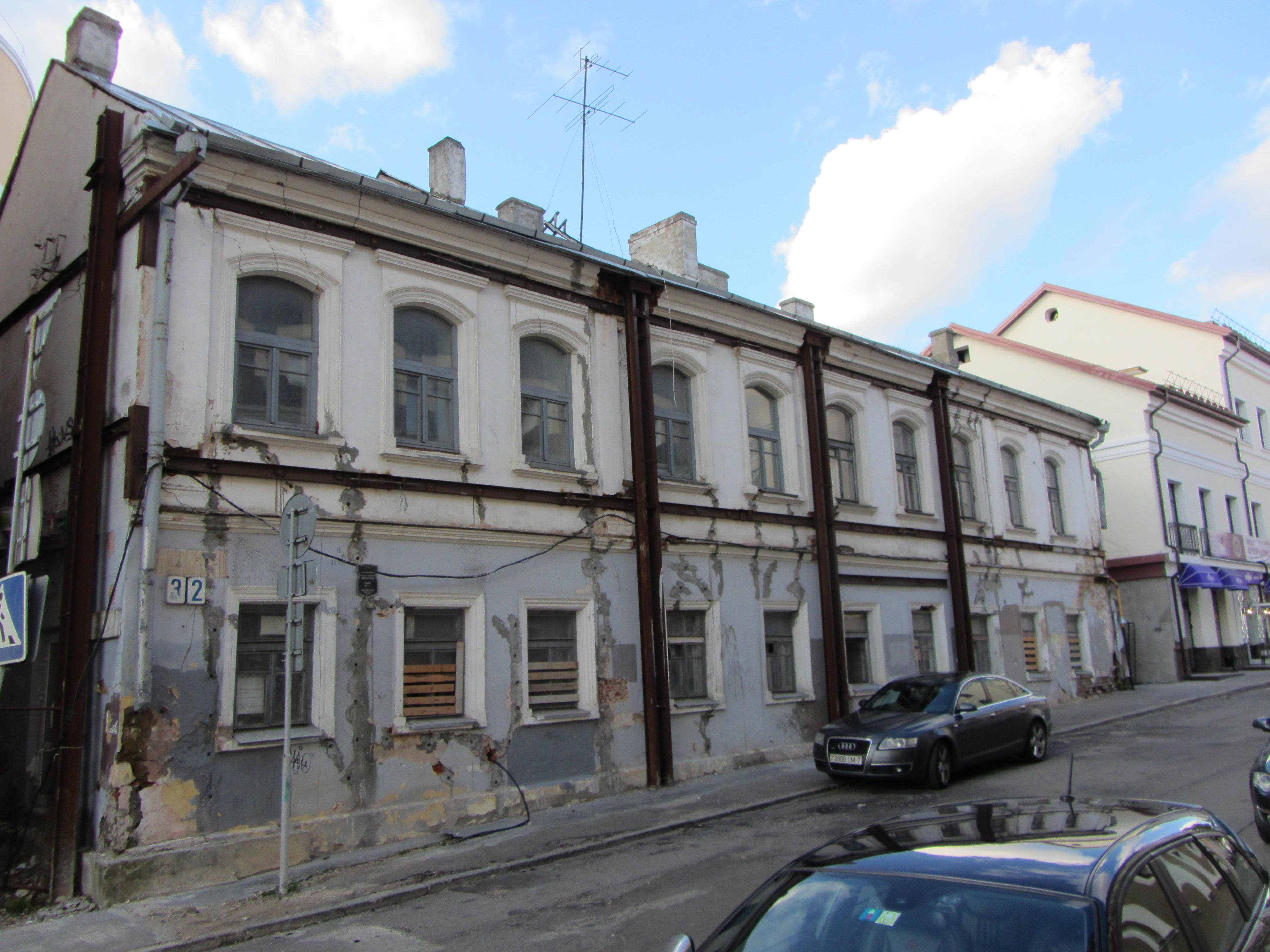 Беларуская (тарашкевіца): Вуліца Рэвалюцыйная, 32